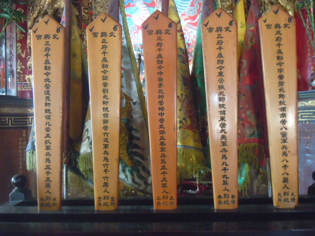 文興宮五營元帥令牌：「東營九夷軍－青旗（青龍）」、「南營八蠻軍－紅旗（朱雀）」、「西營六戎軍－白旗（白虎）」、「北營五狄軍」－黑旗（玄武）、「中壇三秦軍－黃旗（黃帝）」。